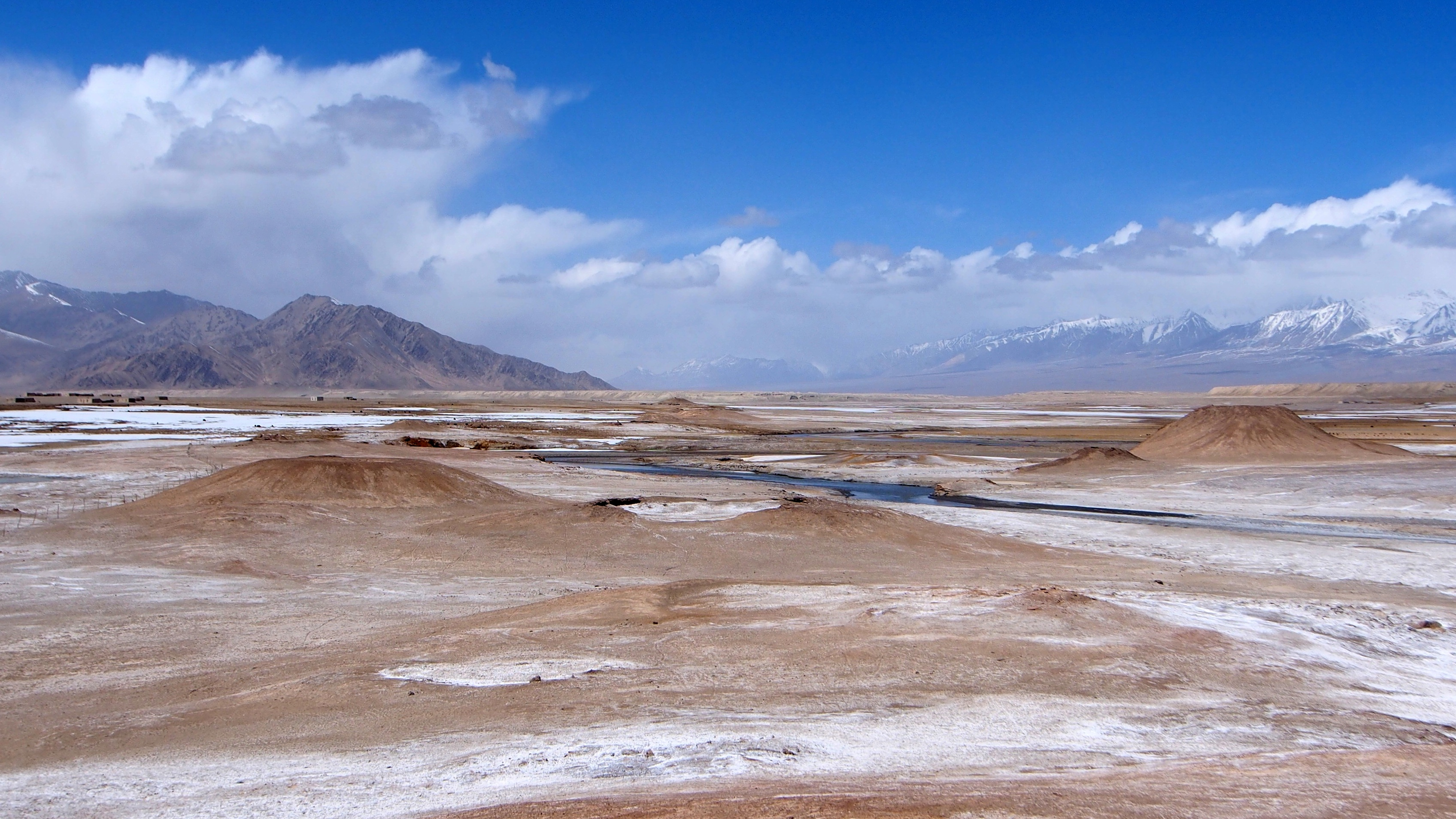 木吉火山群 - Muji Volcanoes - 2015.04